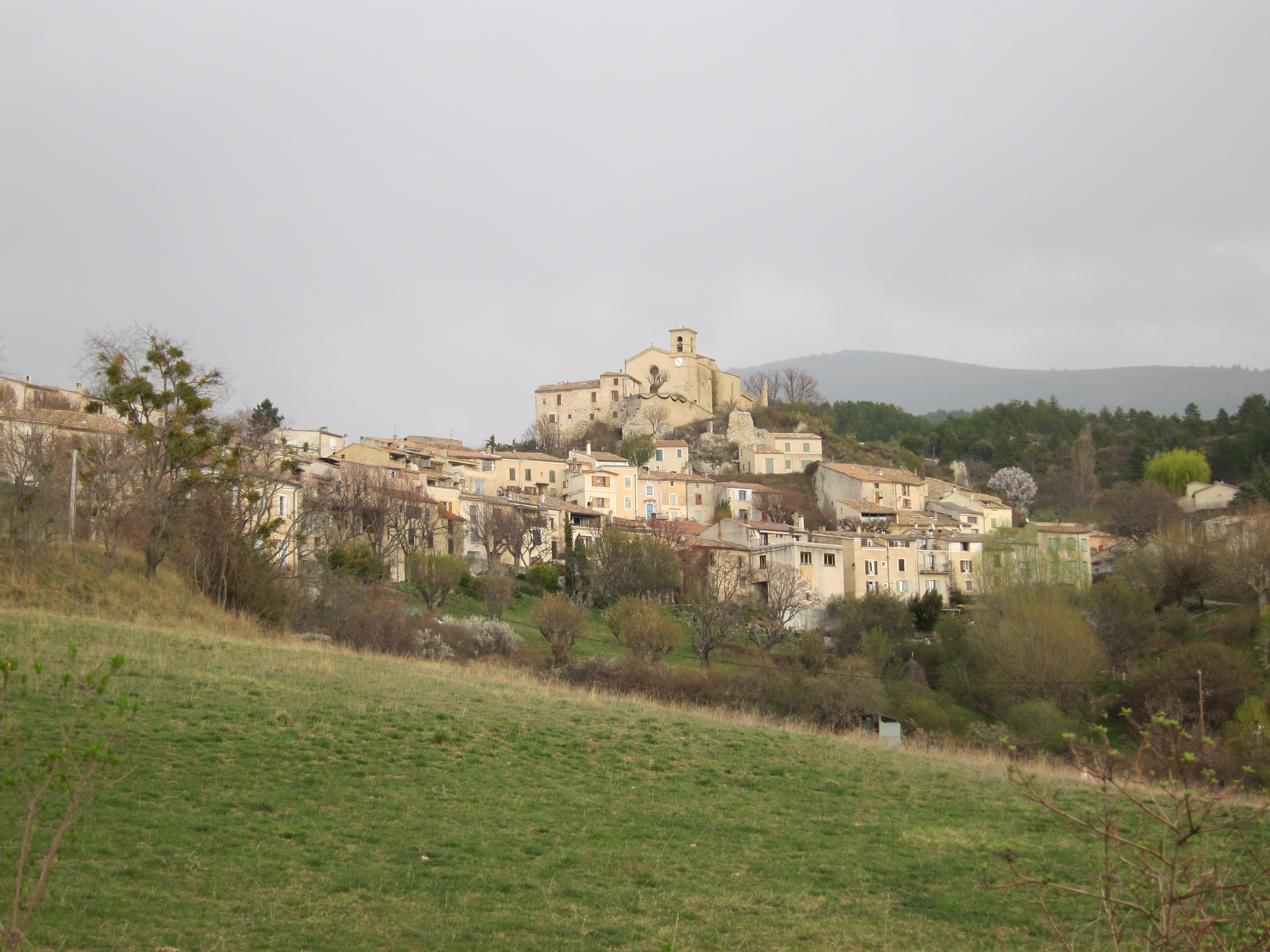 Village de Provence, prise de vue direction Est-Nord-Est, temps pluvieux